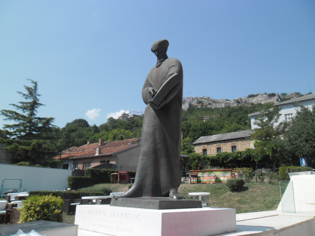 spomenik Marku Maruliću u Kninu